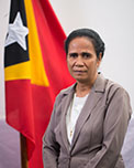 Gabriela Alves, Abgeordnete des Nationalparlaments Osttimors